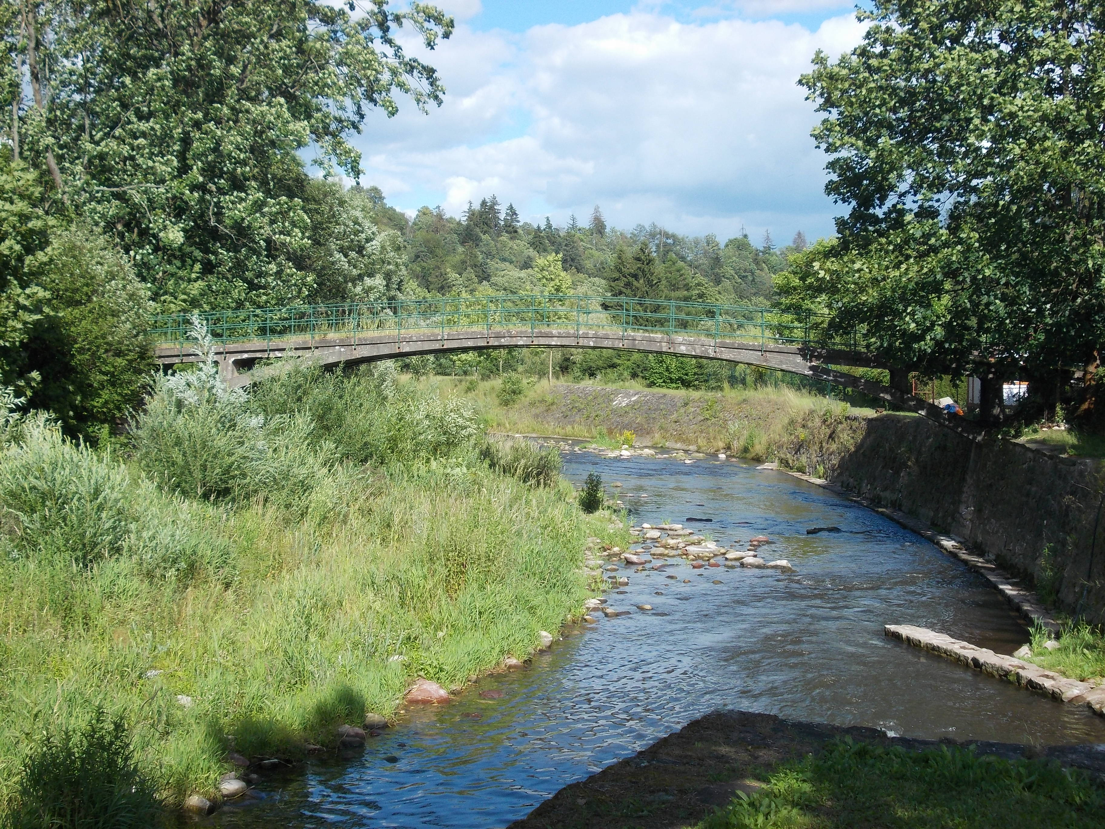 Klášterská Lhota - mostek